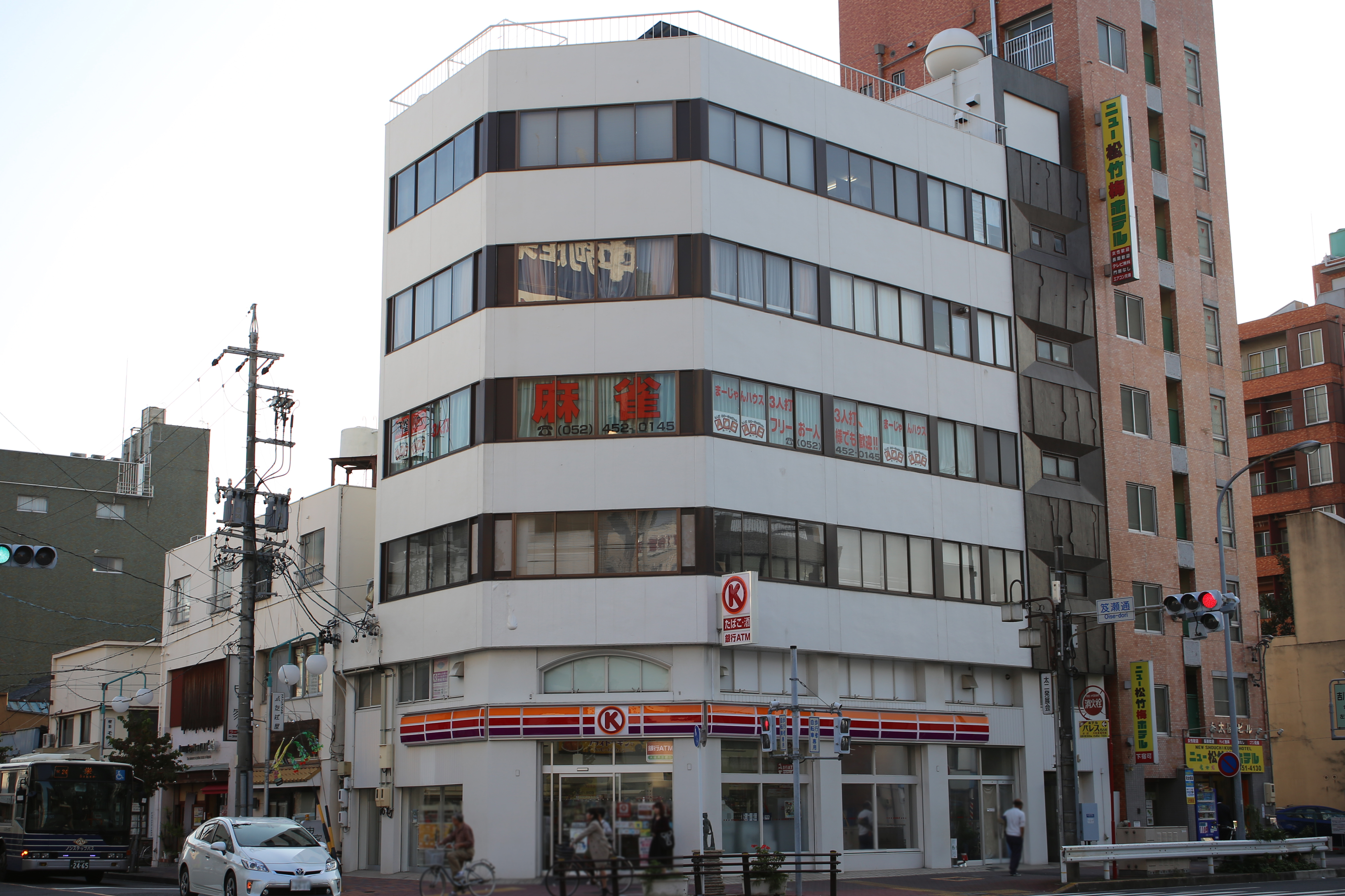 名古屋市中村区太閤四丁目のふたばビルを北側公道東側より撮影